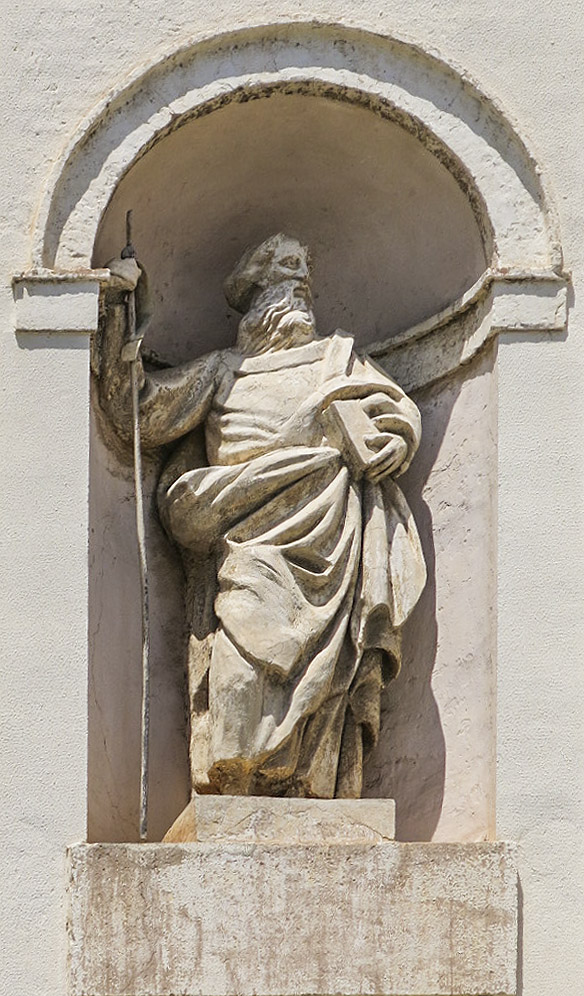 L'església de Sant Pere està situada a la plaça major de Benifaió, poble de la Ribera Alta del País Valencià